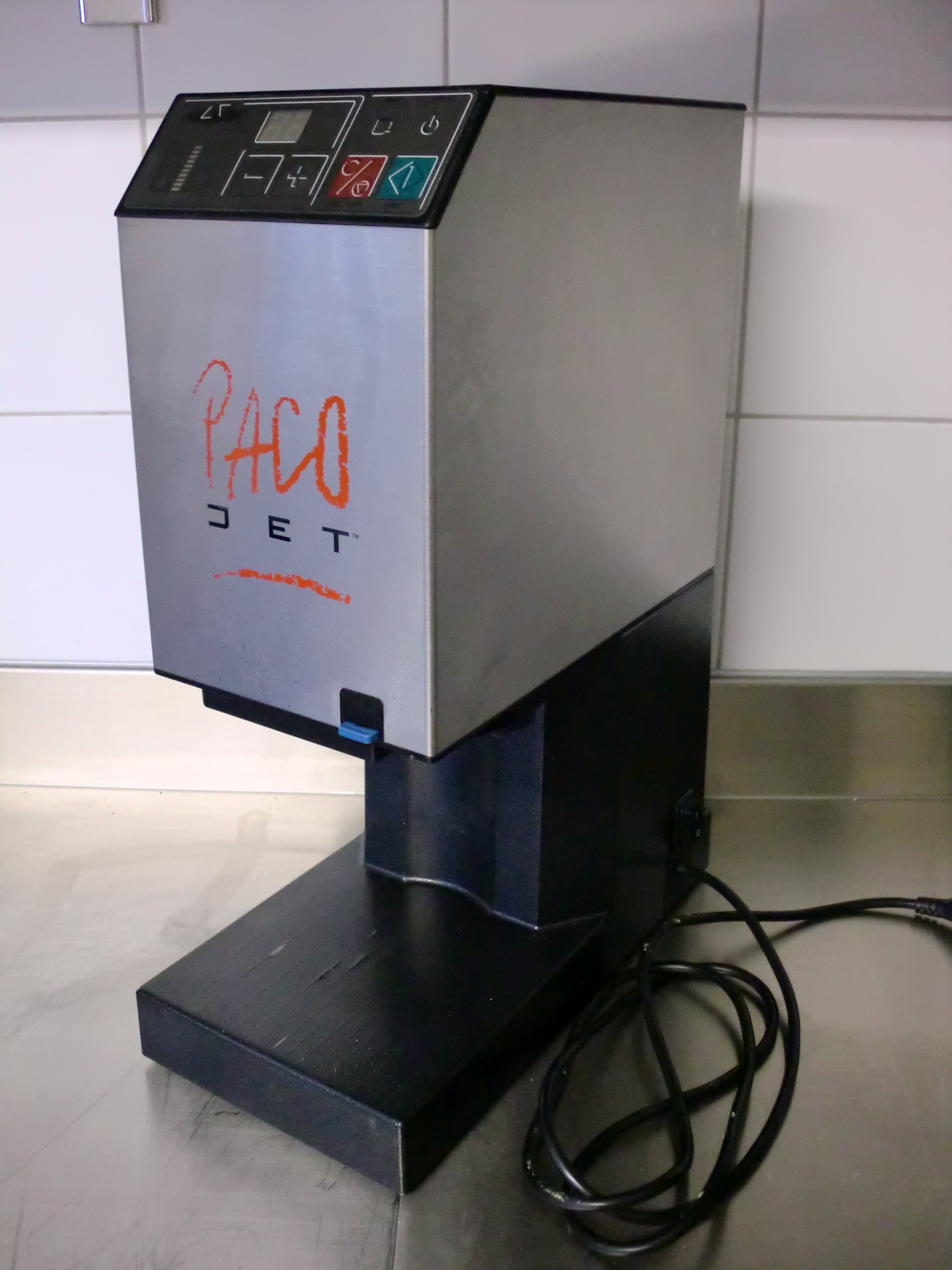 Pacojet Gerät